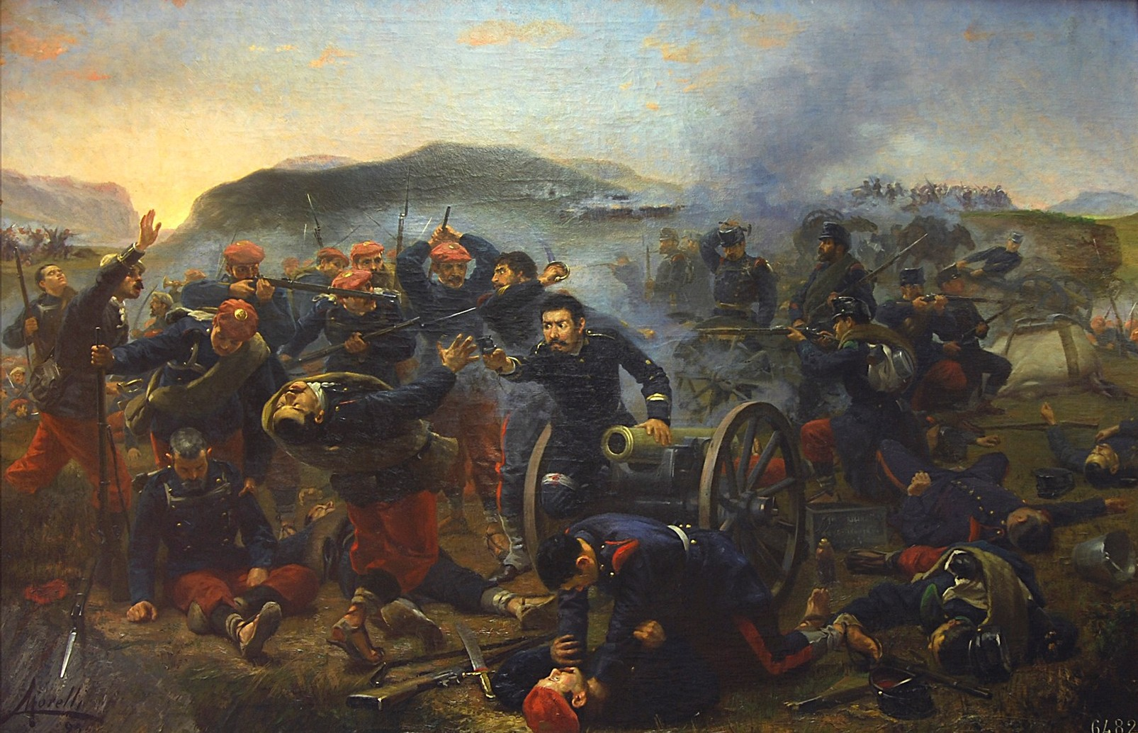 Muerte del Capitan Eduardo Temprado y Pérez el 14 marzo de 1874 en la Batalla de Castellfullit.